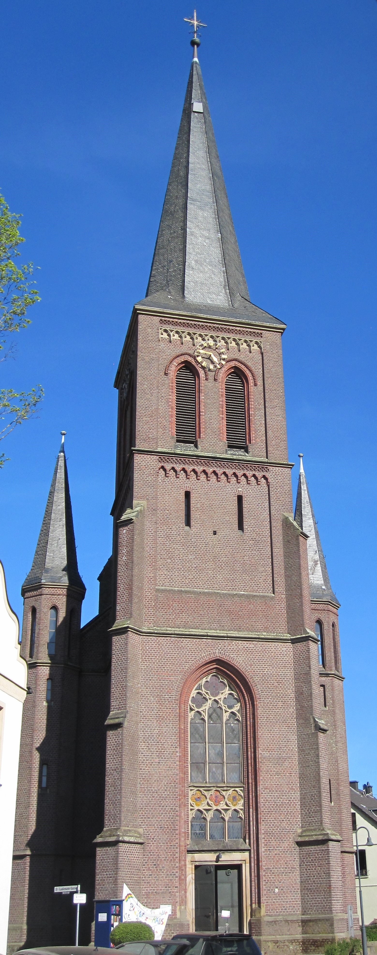 Westseite